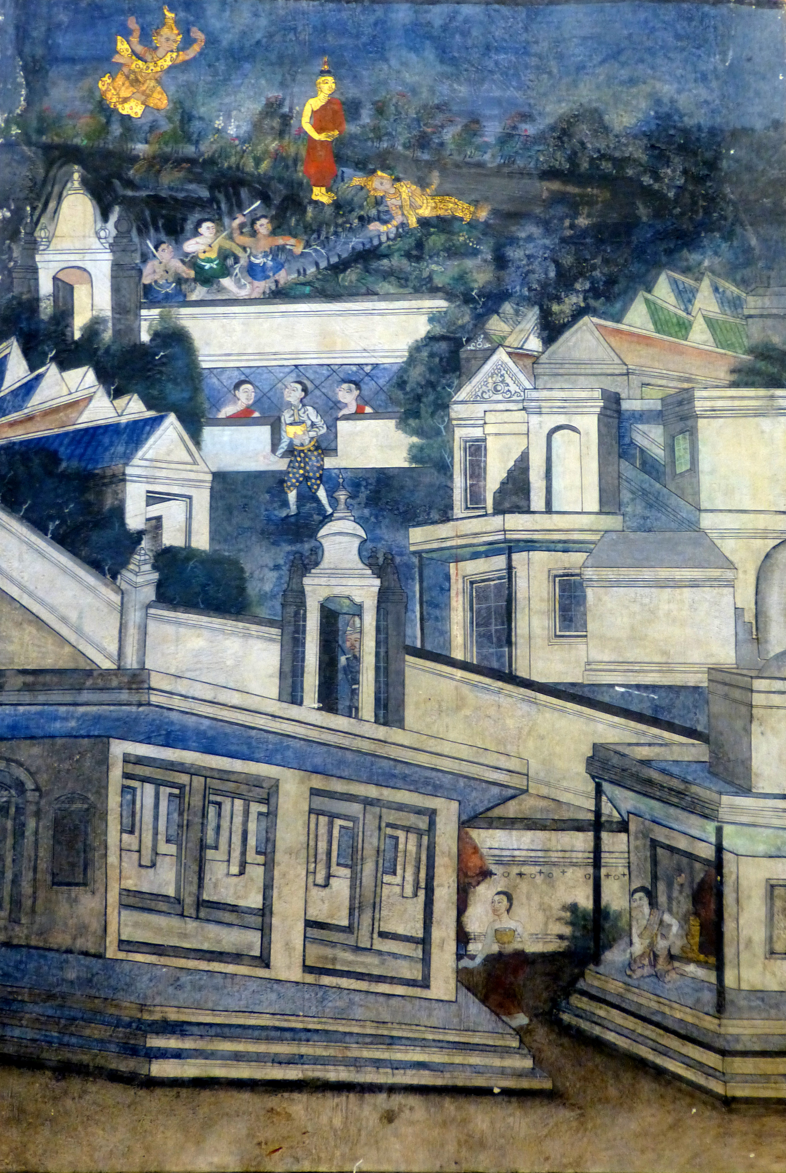 109 Buddha Dipankara and Sumedha, Wat Kasattrathirat, Ayutthaya